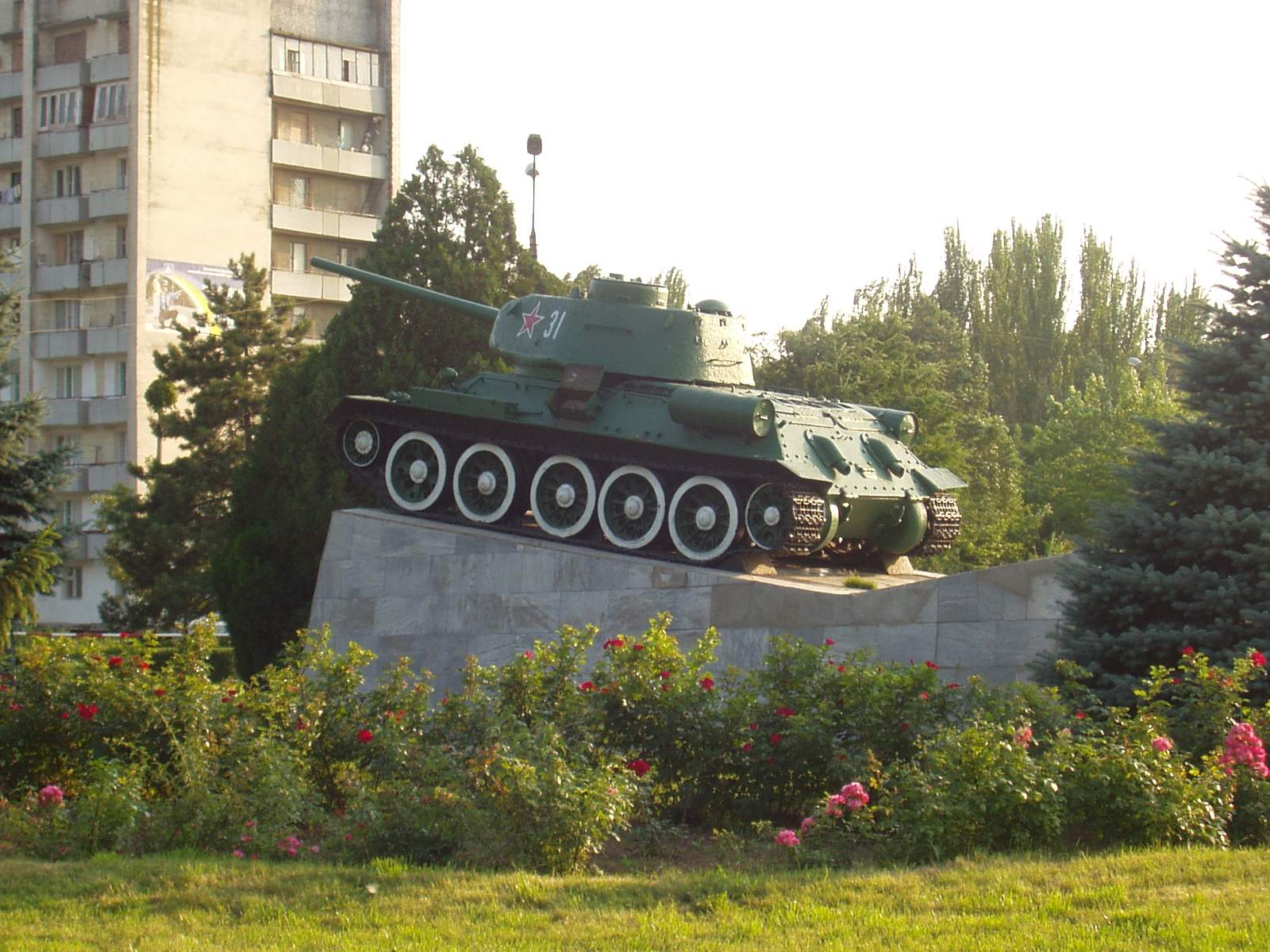 "T-34"